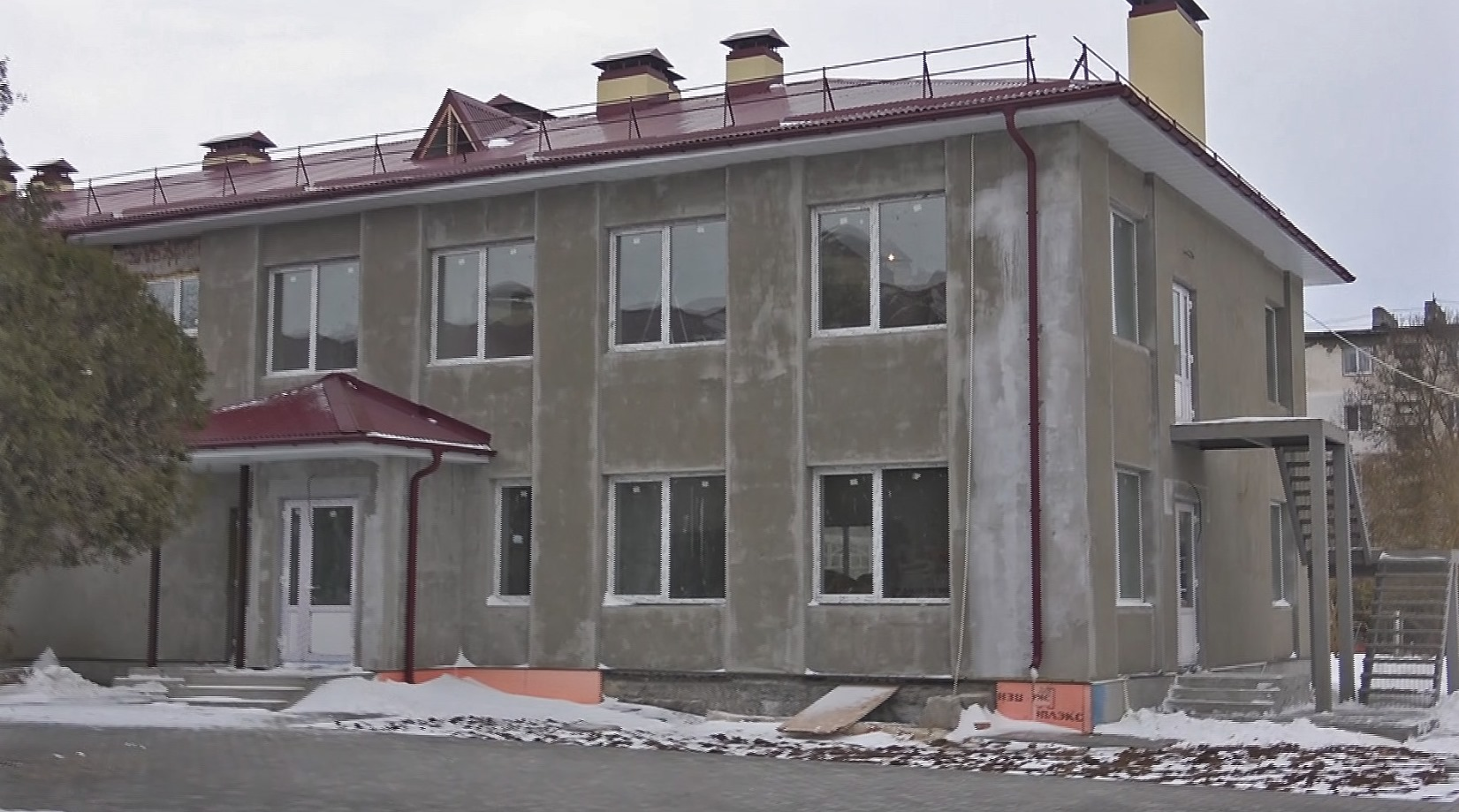 Сергей Аксёнов проинспектировал Евпаторию, где проходил выездной приём граждан членами Совмина Крыма и руководителями ведомств